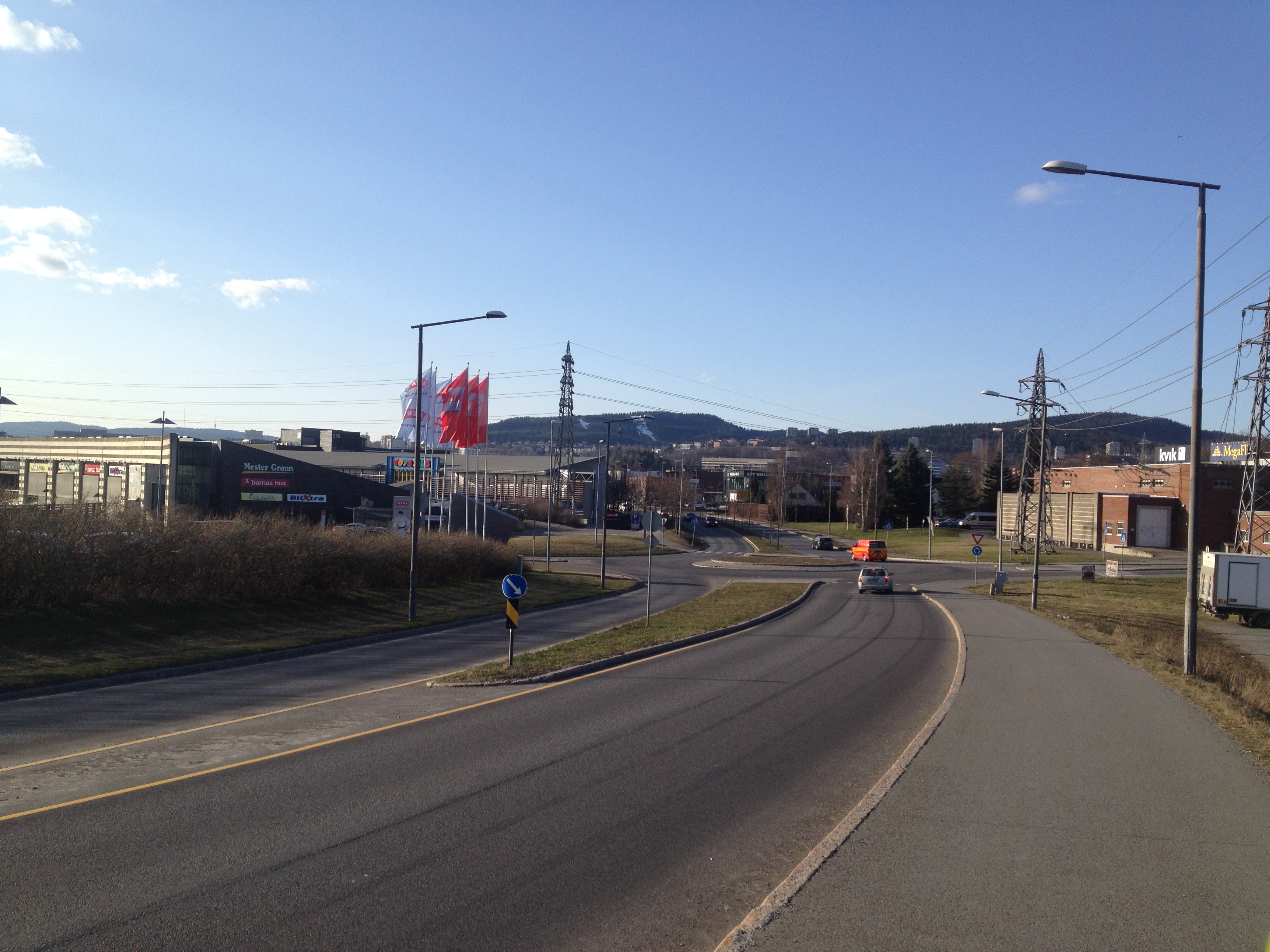 Ytre ringvei på Alnabru i Oslo.